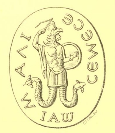 Imagen de Gema Abraxas extraída de la obra The Gnostics and their remains de Charles W. King, 1887. Pueden apreciarse las palabras "IAW" o "IAO" y "ΣΕΜΕΣ ΕΙΛΑΜ", "El Sol Eterno".